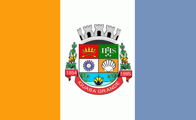 Bandeira oficial do município de Iguaba Grande, no estado do Rio de Janeiro (domínio público segundo os critérios legais).